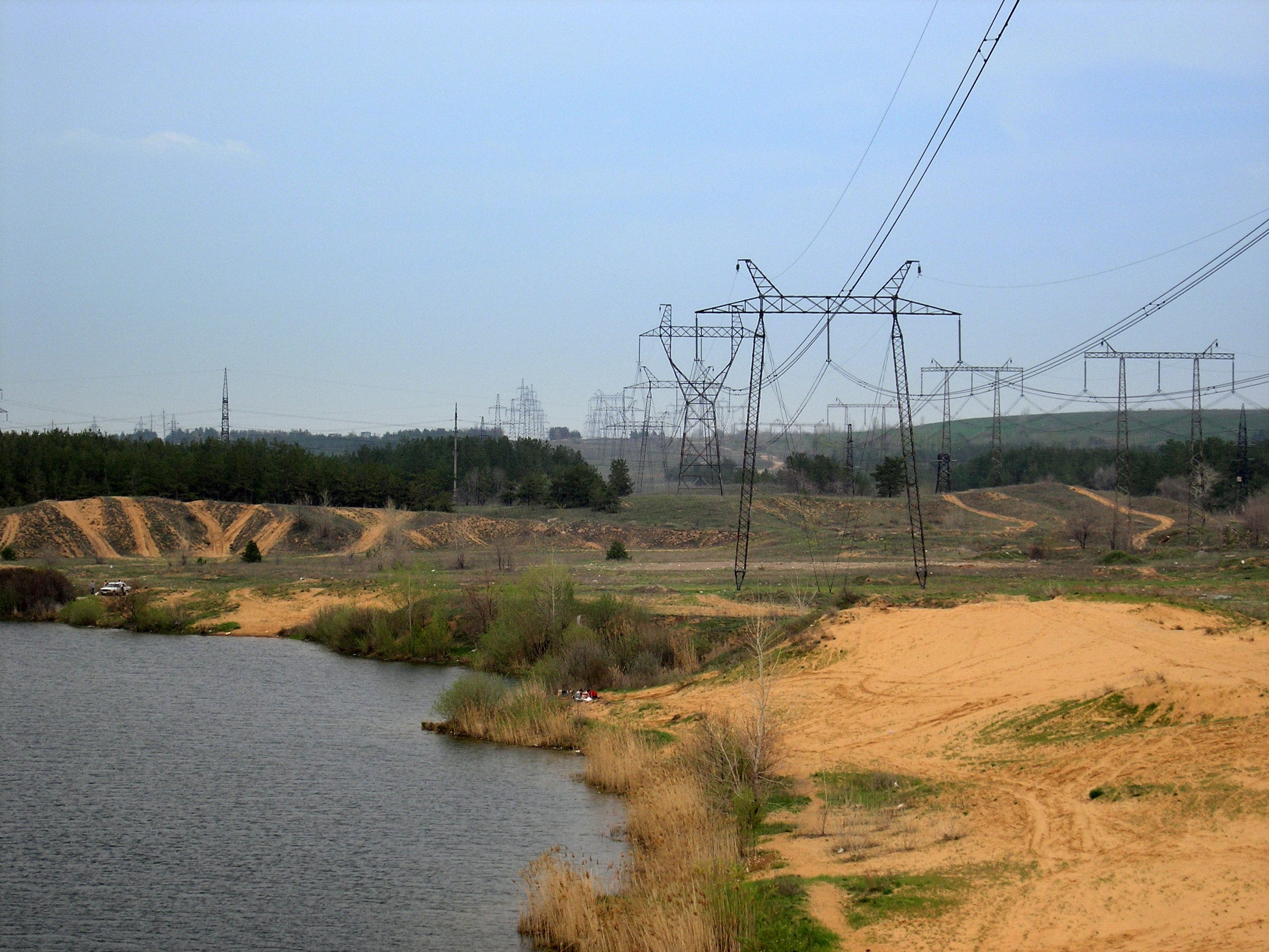 Озеро Пляжное, Тольятти, Россия